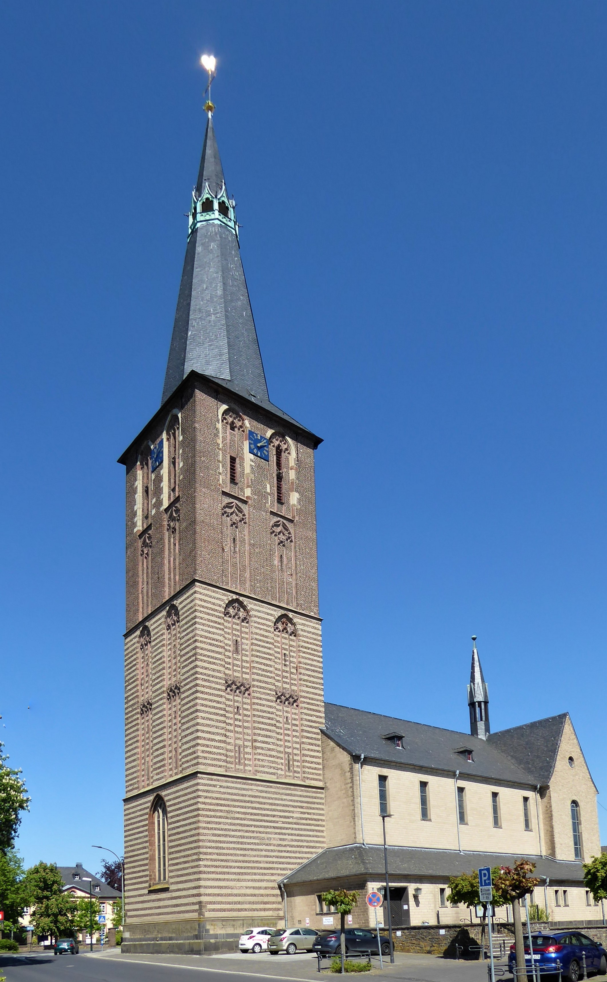 Kirche St. Martinus (Kerpen)